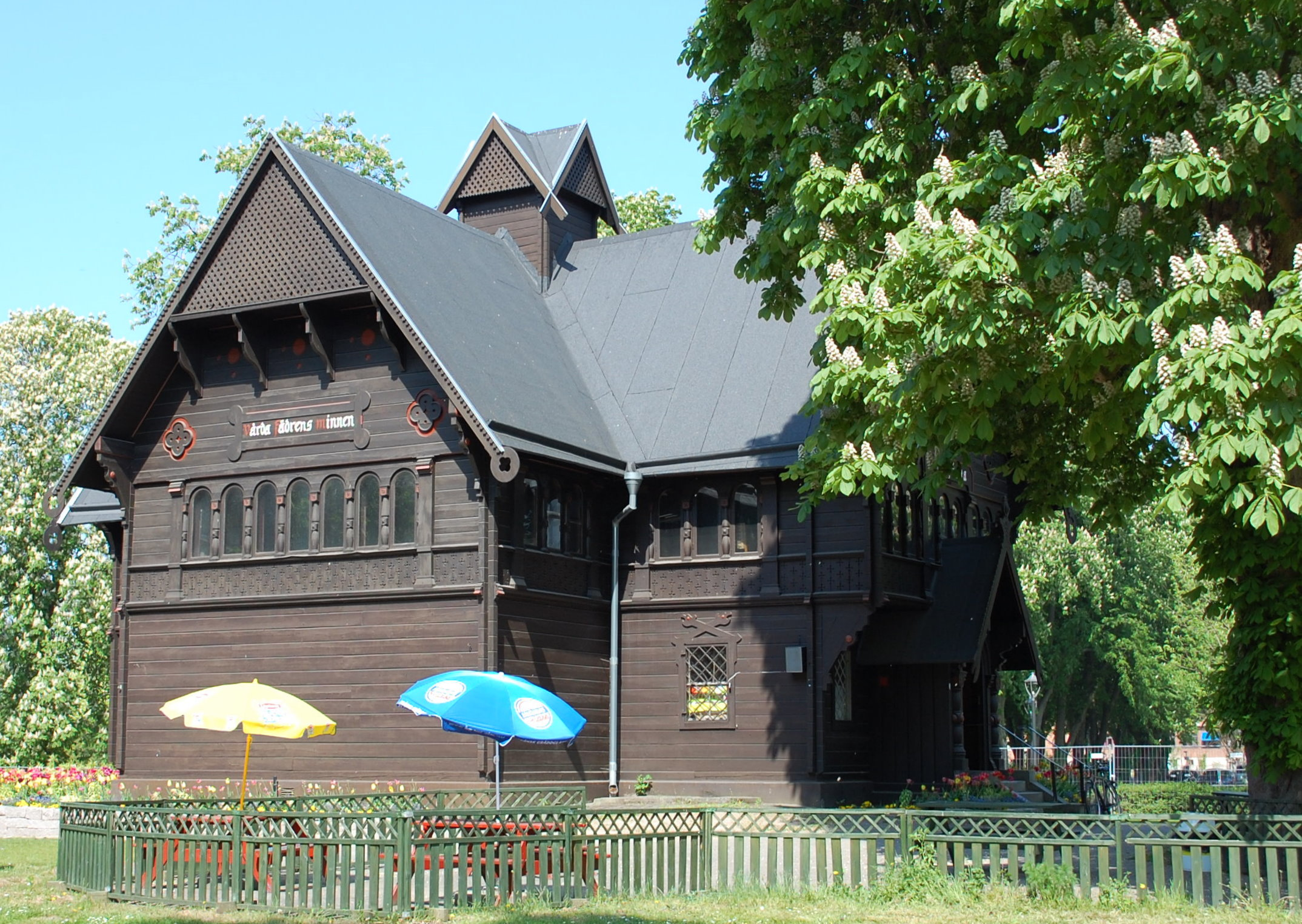 Fornstugan im Tivolipark in Kristianstad